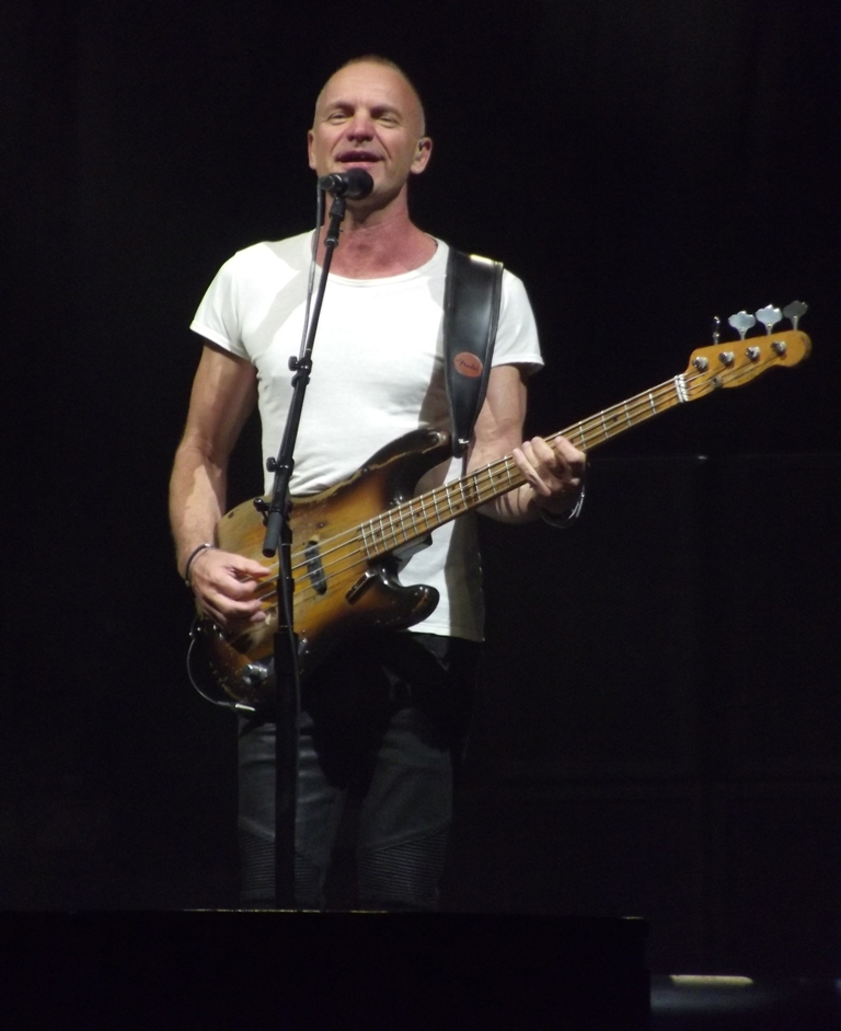 Zdjęcie zrobione podczas drugiego dnia Life Festivalu 2013 w Oświęcimiu.